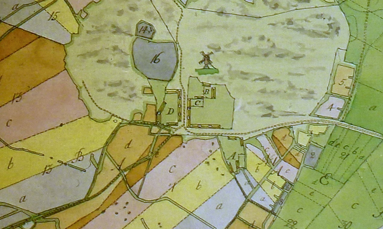 Sundby kvarn på en karta från 1763